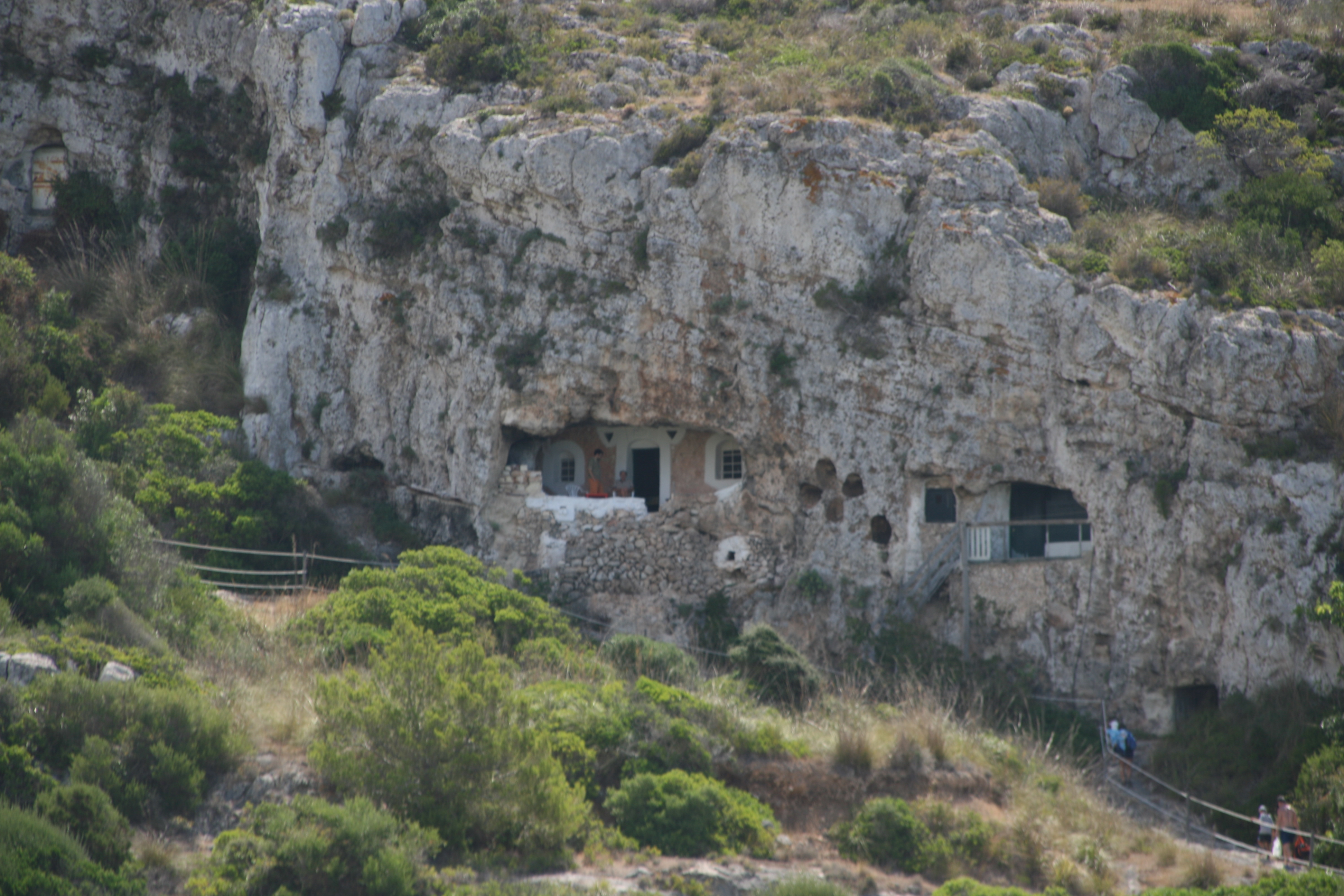 Vista del hipogeo situado en el acantilado que cierra por el este la playa de Son Bou en Menorca